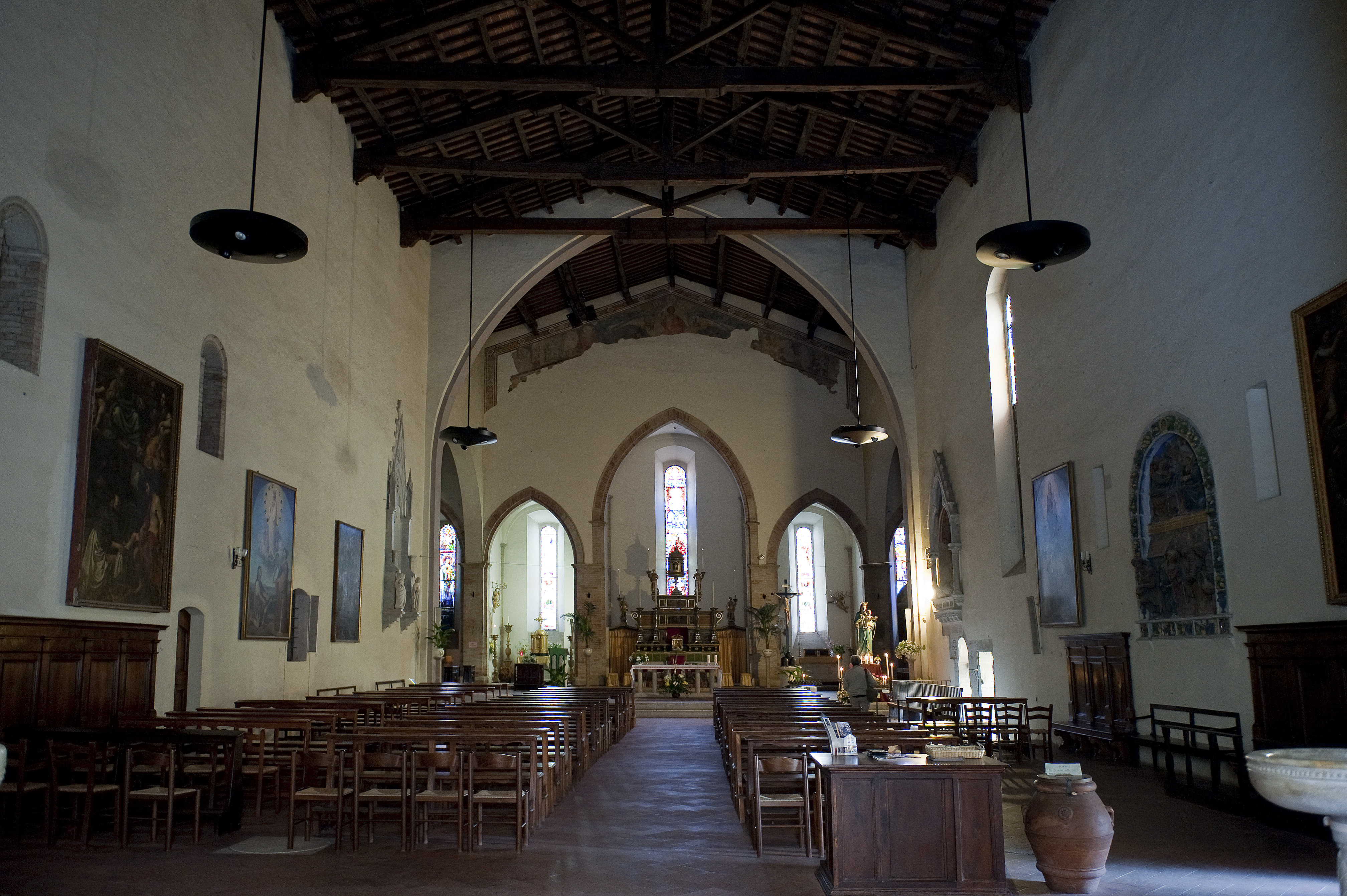 interno della Collegiata di Casole d'Elsa